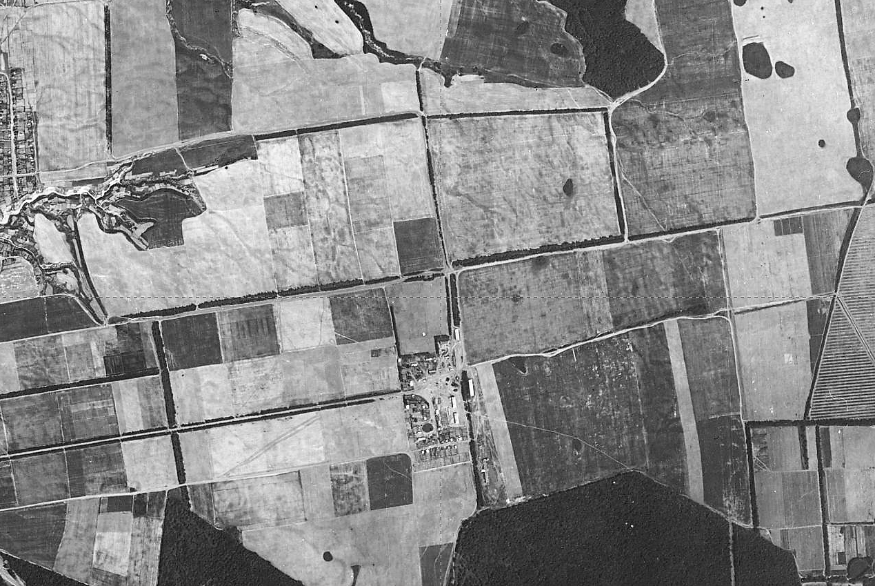 Казань. Защитные лесополосы вокруг полей на месте будущего жилого района Горки (июнь 1966)